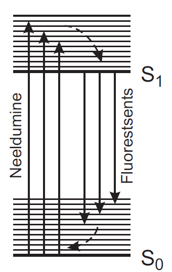 Tüüpilise molekuli energiatasemete skeem